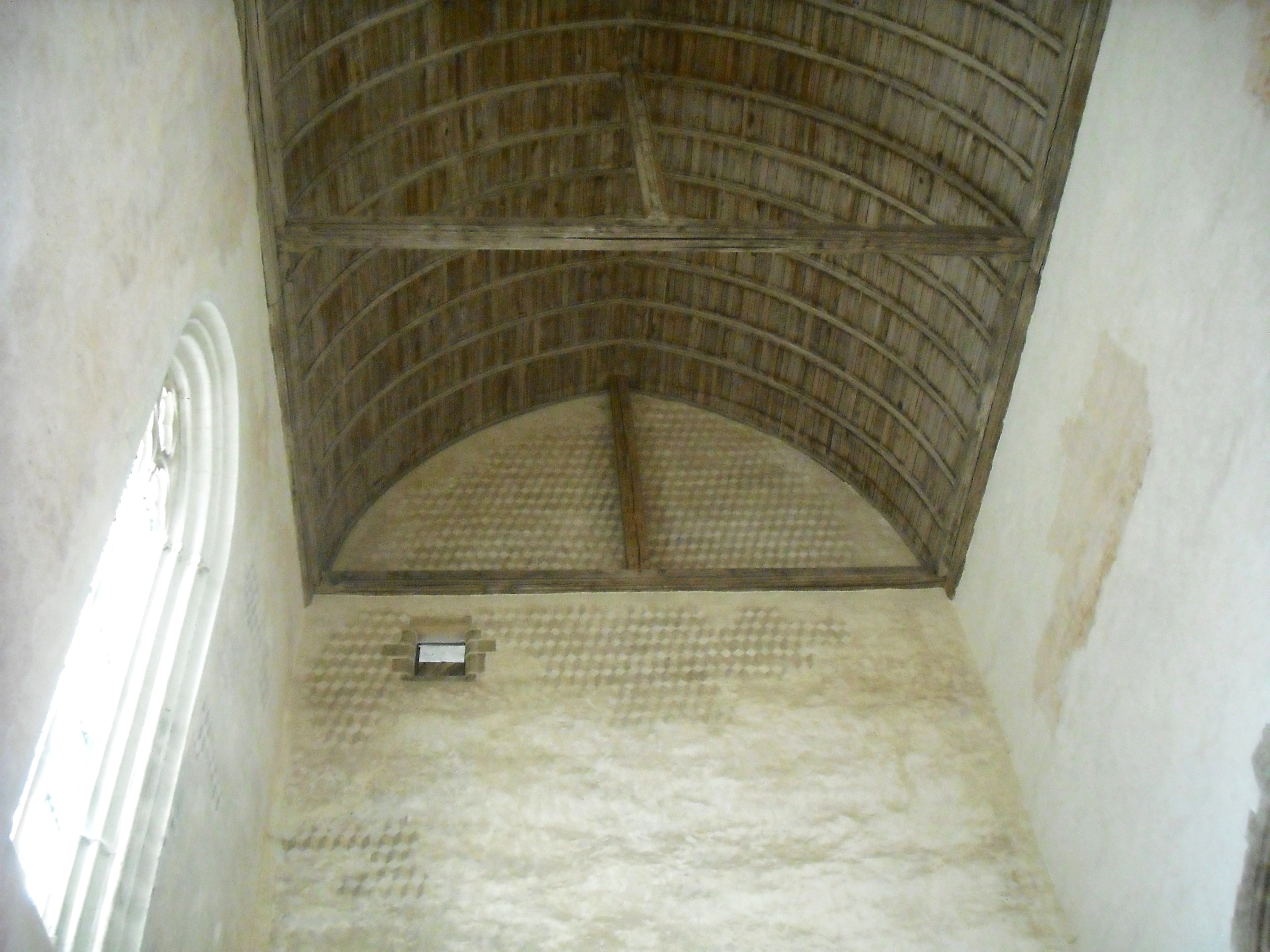 Intérieur de la chapelle du Château de Châteaubriant, Châteaubriant, France.